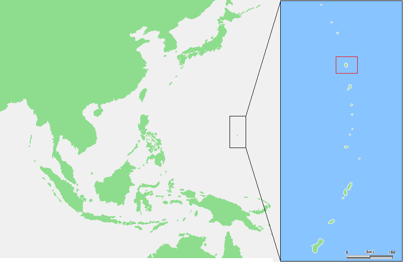 Mariana Islands - Agrihan.PNG